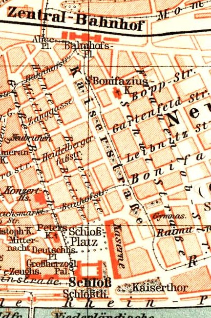 Stadtplan (Umgebung) von Mainz, hier Kaiserstraße (Mainz)